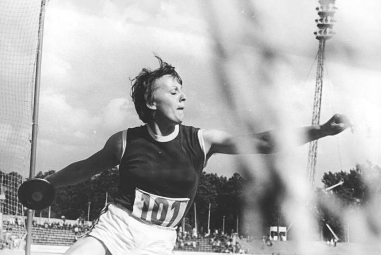 Gabriele Hinzmann ADN-ZB Demme 15.08.1972 Berlin:DDR-Olympiamannschaft 1972-Leichtathletik: Gabriele Hinzmann (SC DHfK)